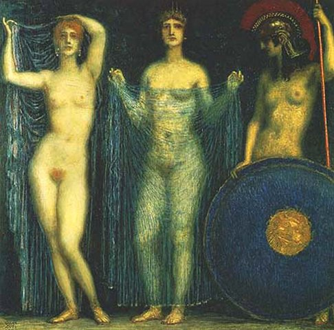 Die Drei Gottinnen Athena Hera Aphrodite